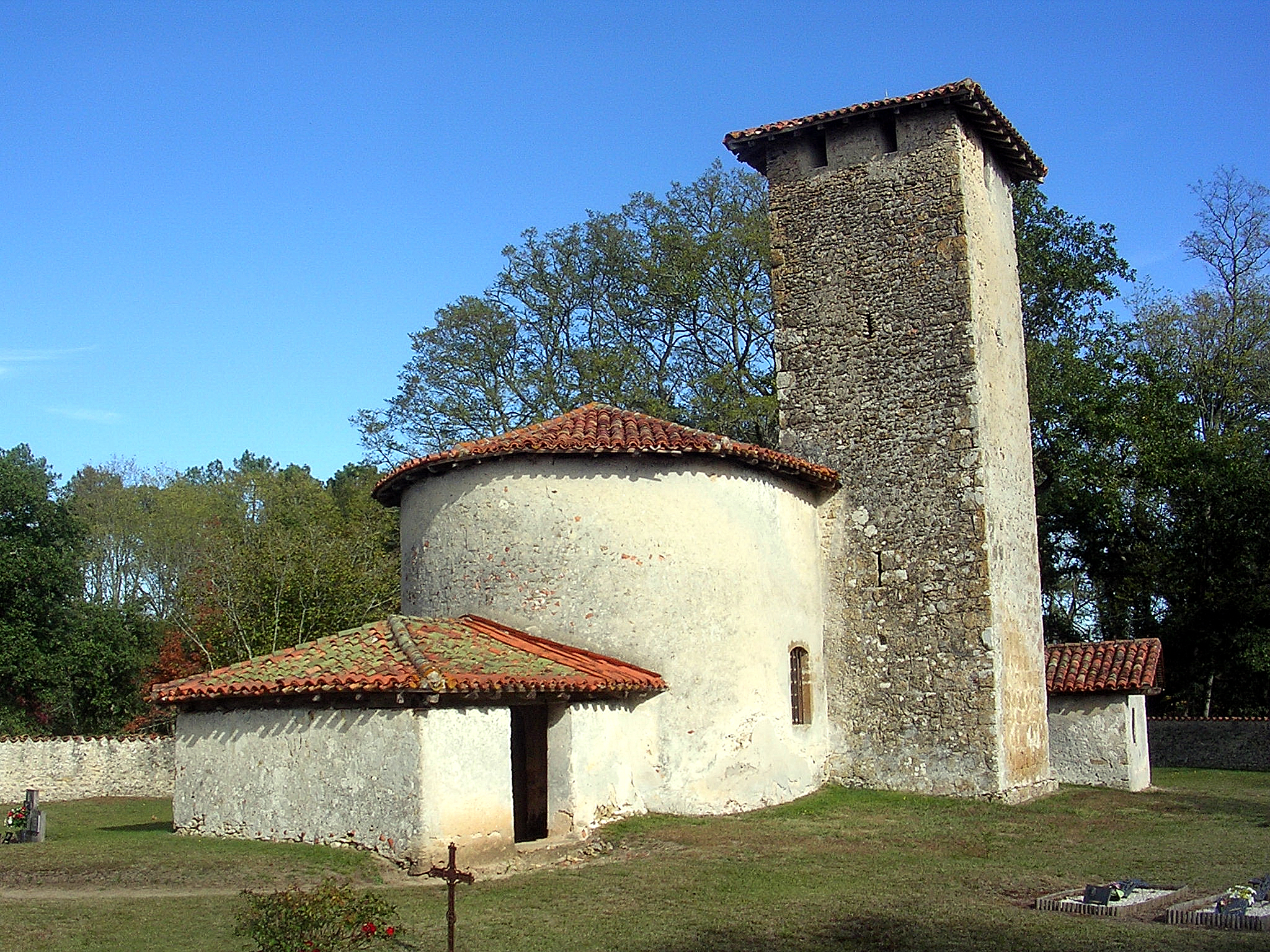 Église Saint-Michel de Réaut (Canenx-et-Réaut, Landes, France)